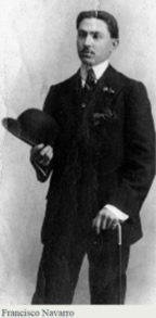 Fotografía juvenil, en torno a 1905, del doctor Francisco Navarro López (Osuna, Sevilla, 4 de diciembre de 1889 - Sevilla, 27 de febrero de 1969) – fue un médico sevillano, fundador de la Clínica Nuestra Señora de los Reyes y 18ª Presidente del Real Betis Balompie-.